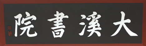 숙종의 어필을 집자함.